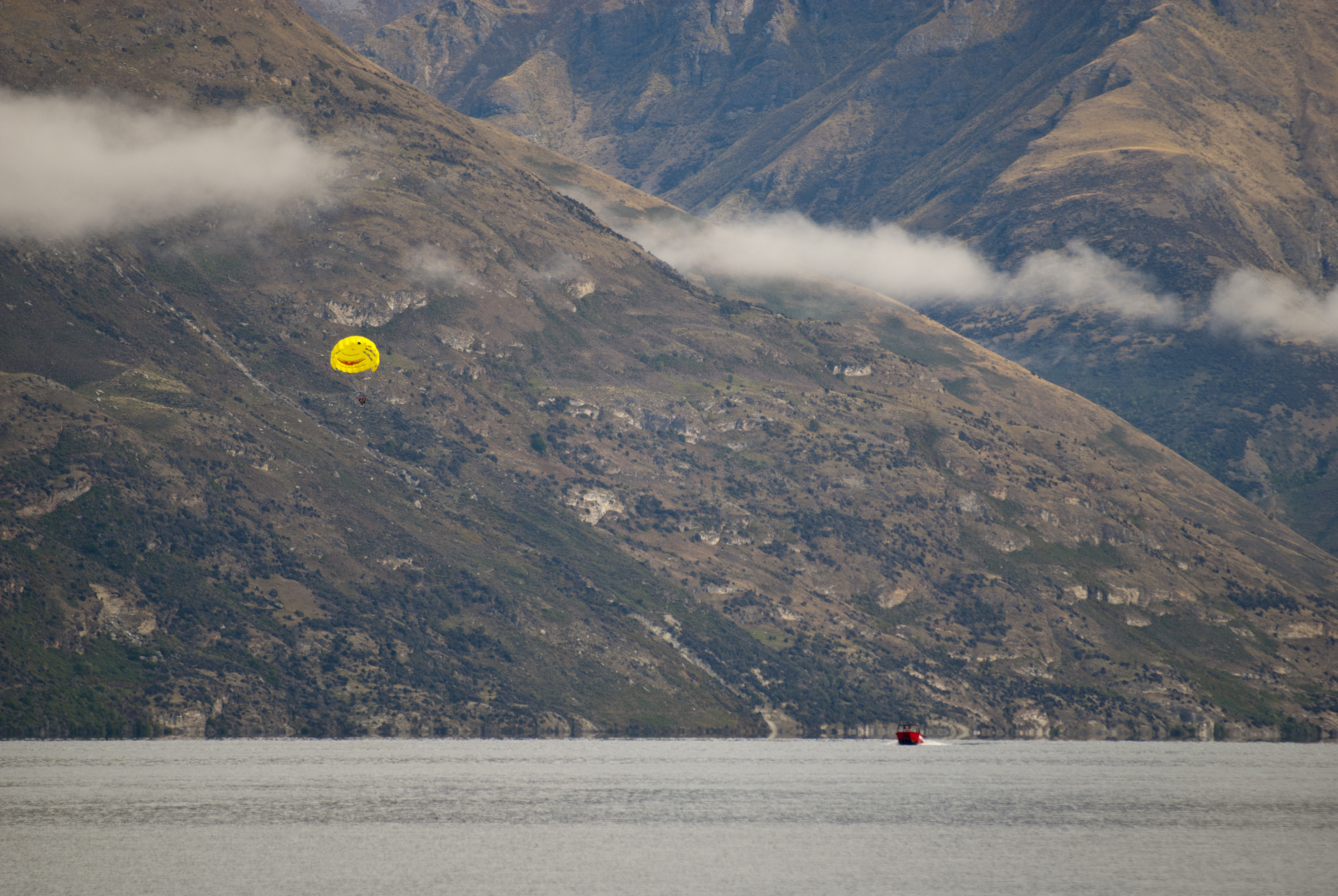 Lake Wakatipu